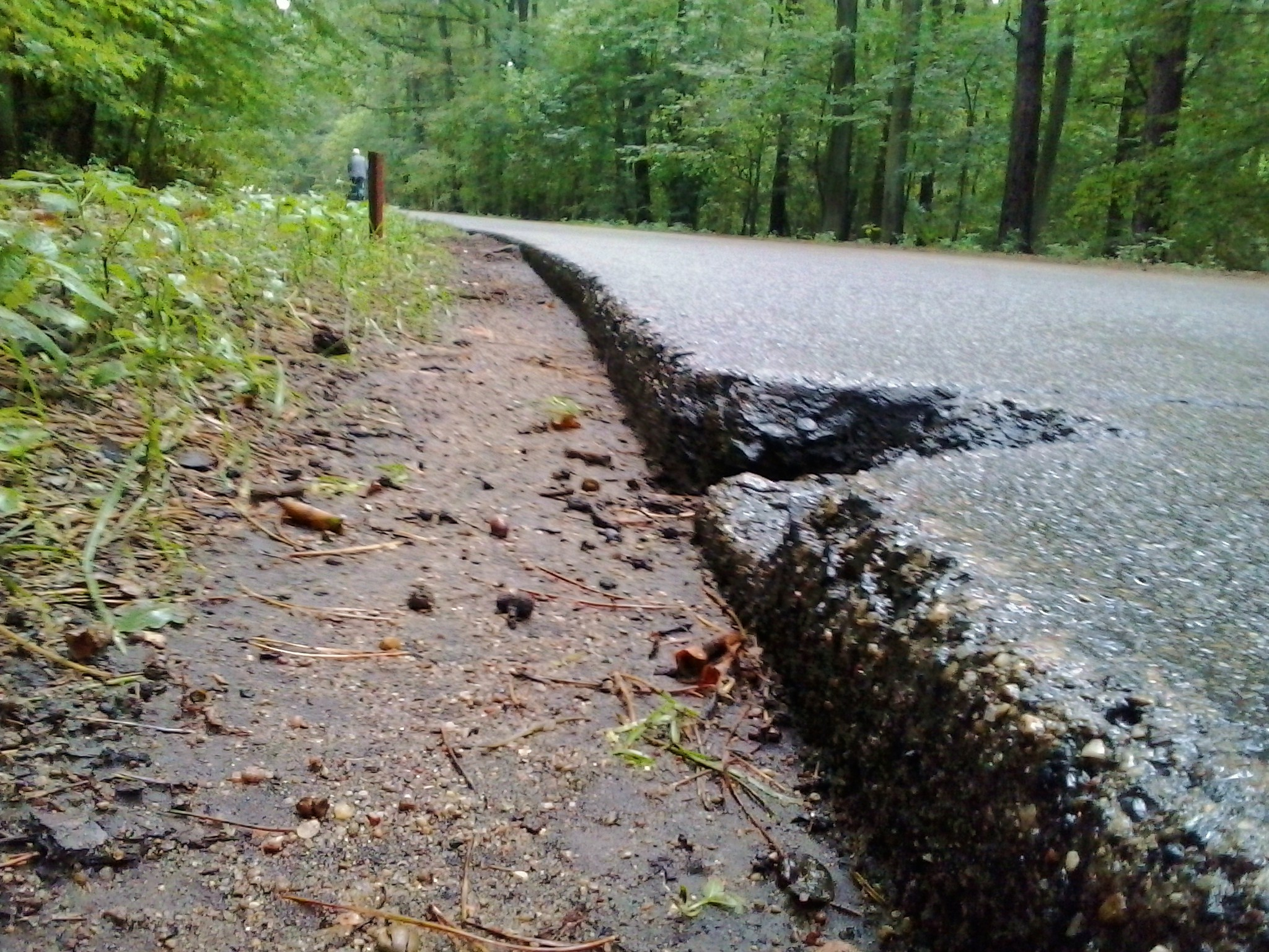 Droga Grajzerówka nieopodal Jezior.